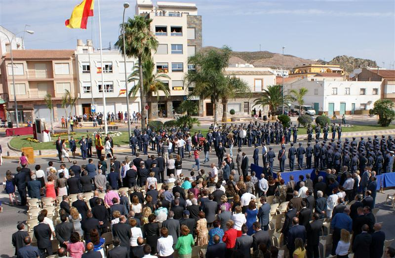 Acto de Jura de Bandera celebrado el 4 de julio de 2010 con motivo de la celebración de la creación del municipio de Puerto Lumbreras